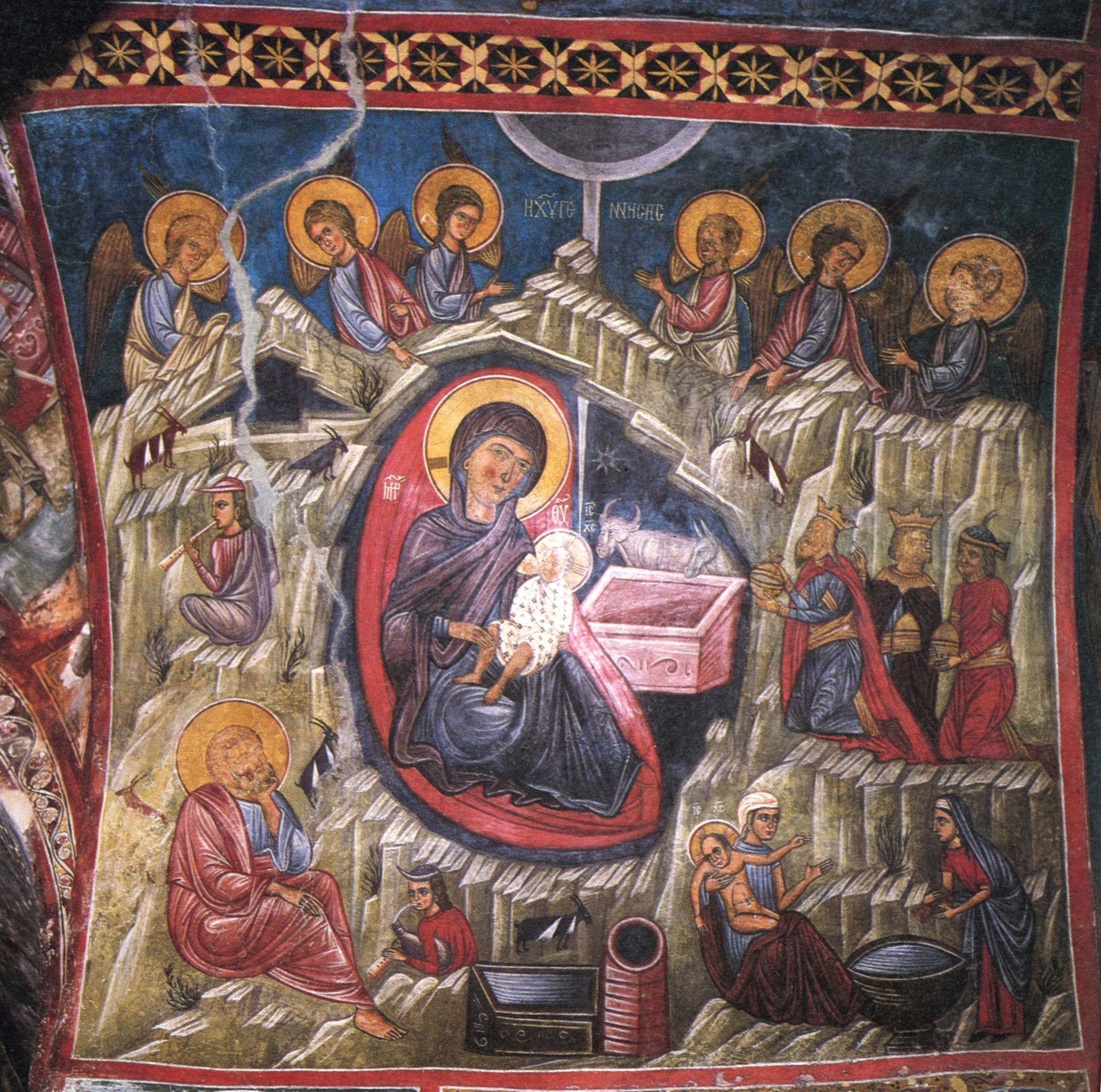 Fresko der Geburt Jesu in Agios Nikolaos tis stegis in Kakopetria, Zypern